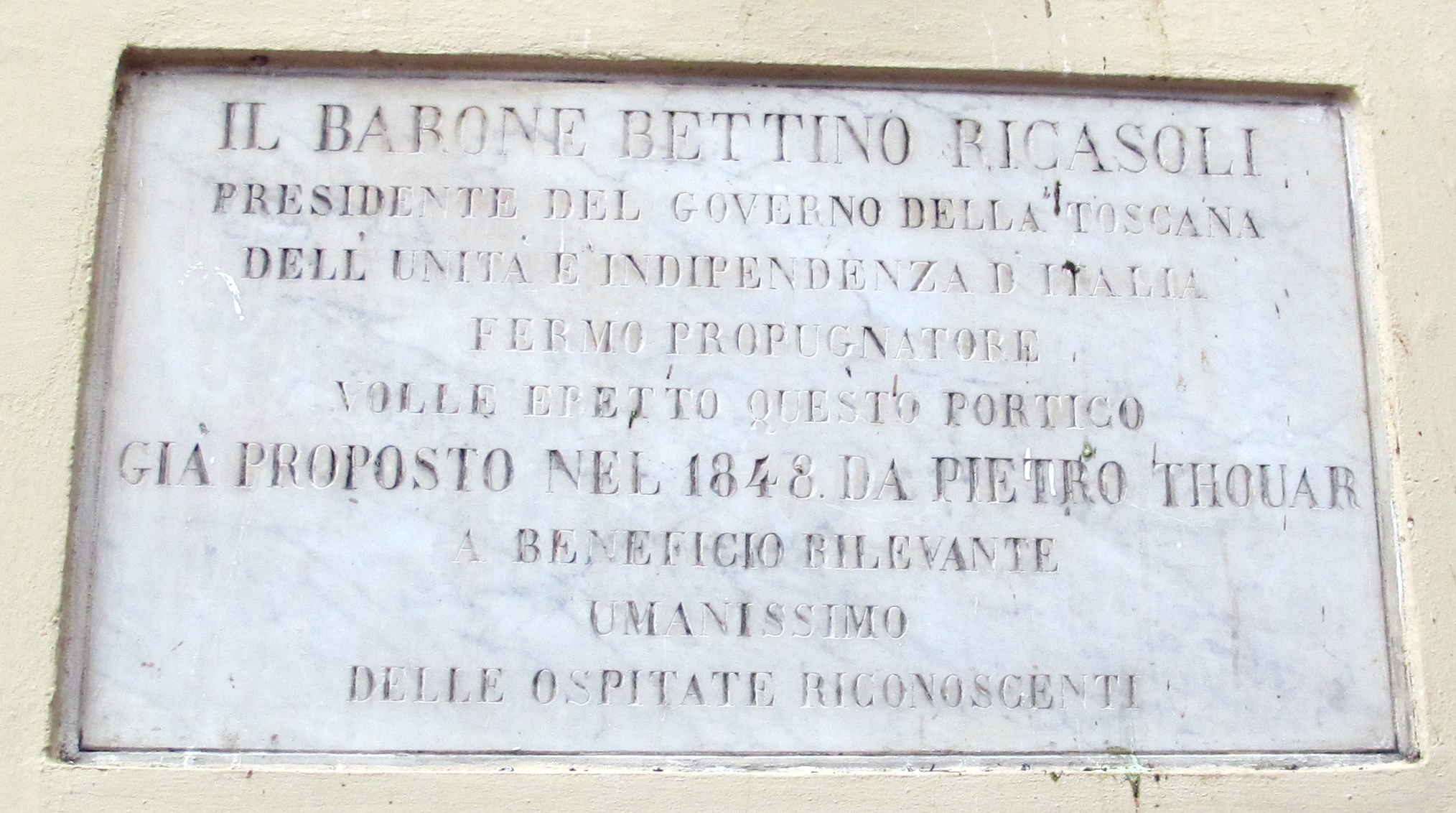 Montedomini, targa bettino ricasoli